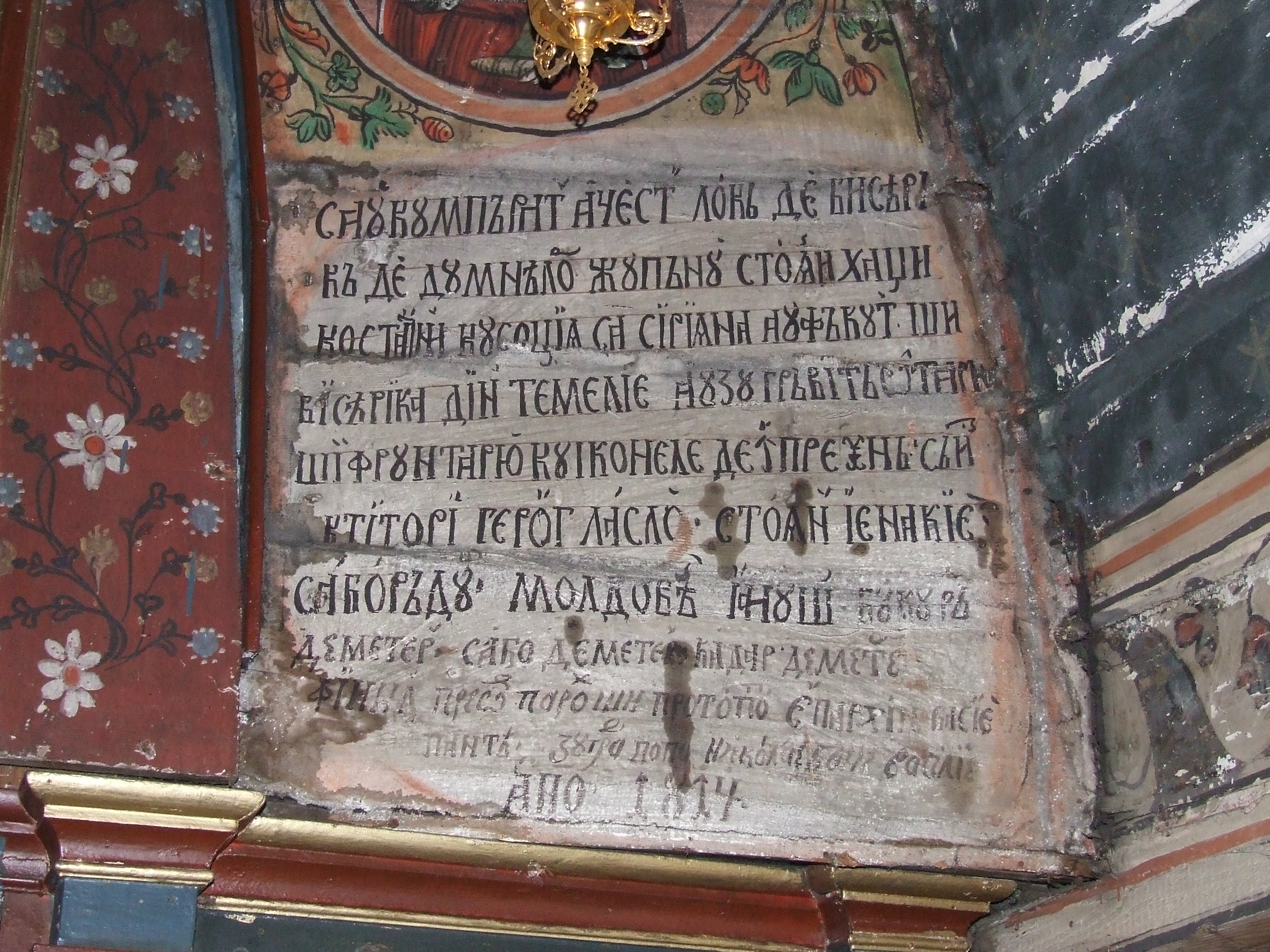 Biserica de lemn din Târgu Mureş, judeţul Mureş.